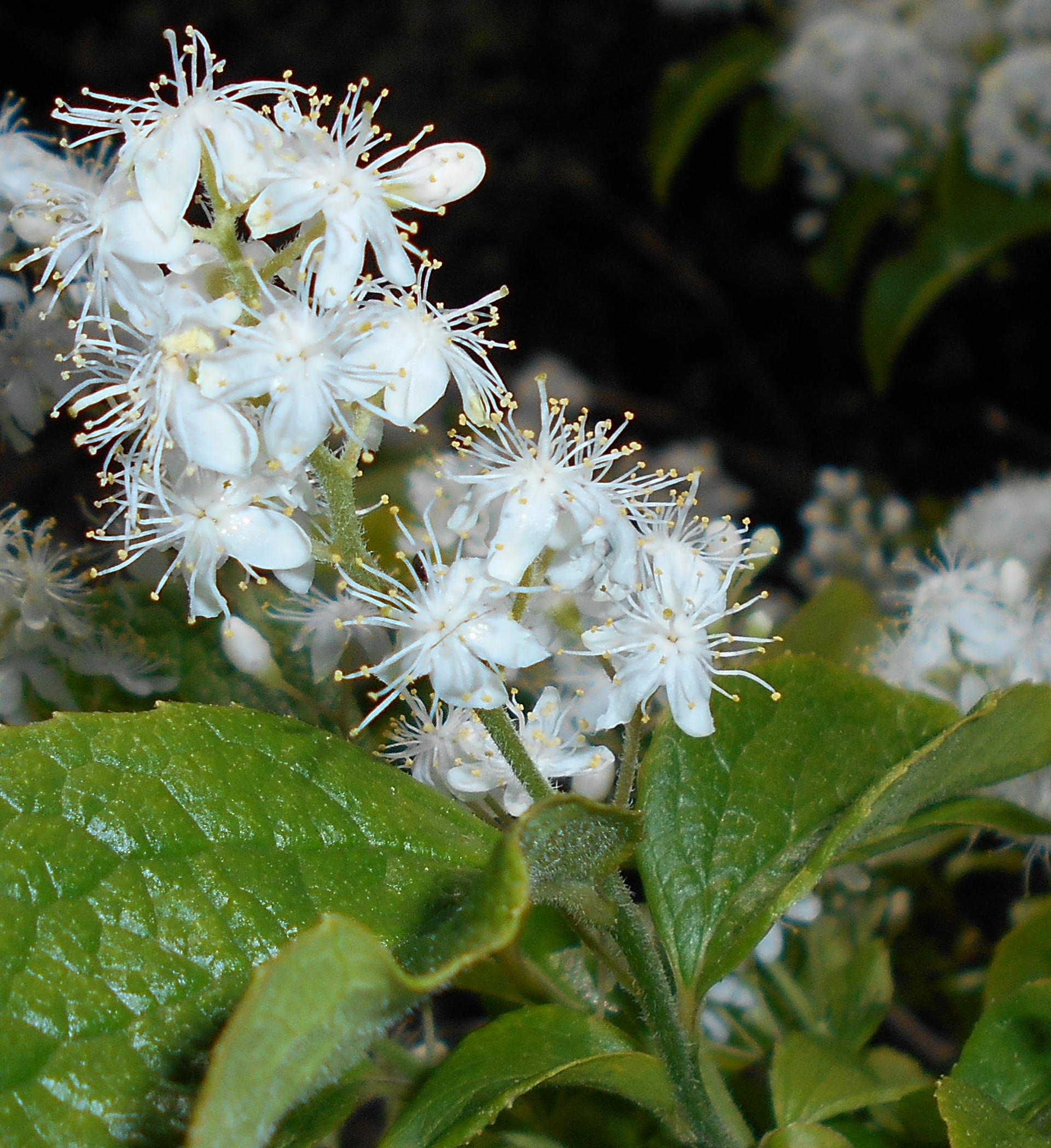 Symplokos wiechowaty (Symplocos paniculata), Ogród Botaniczny UMCS w Lublinie